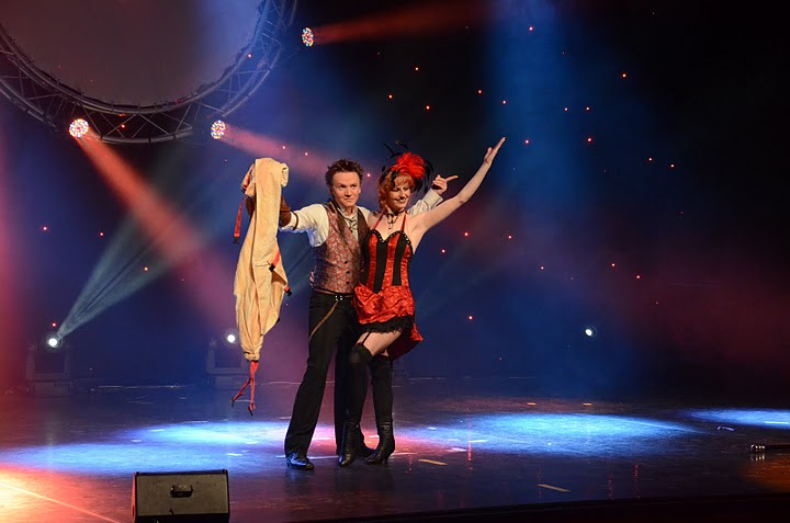 malle des indes haubourdin